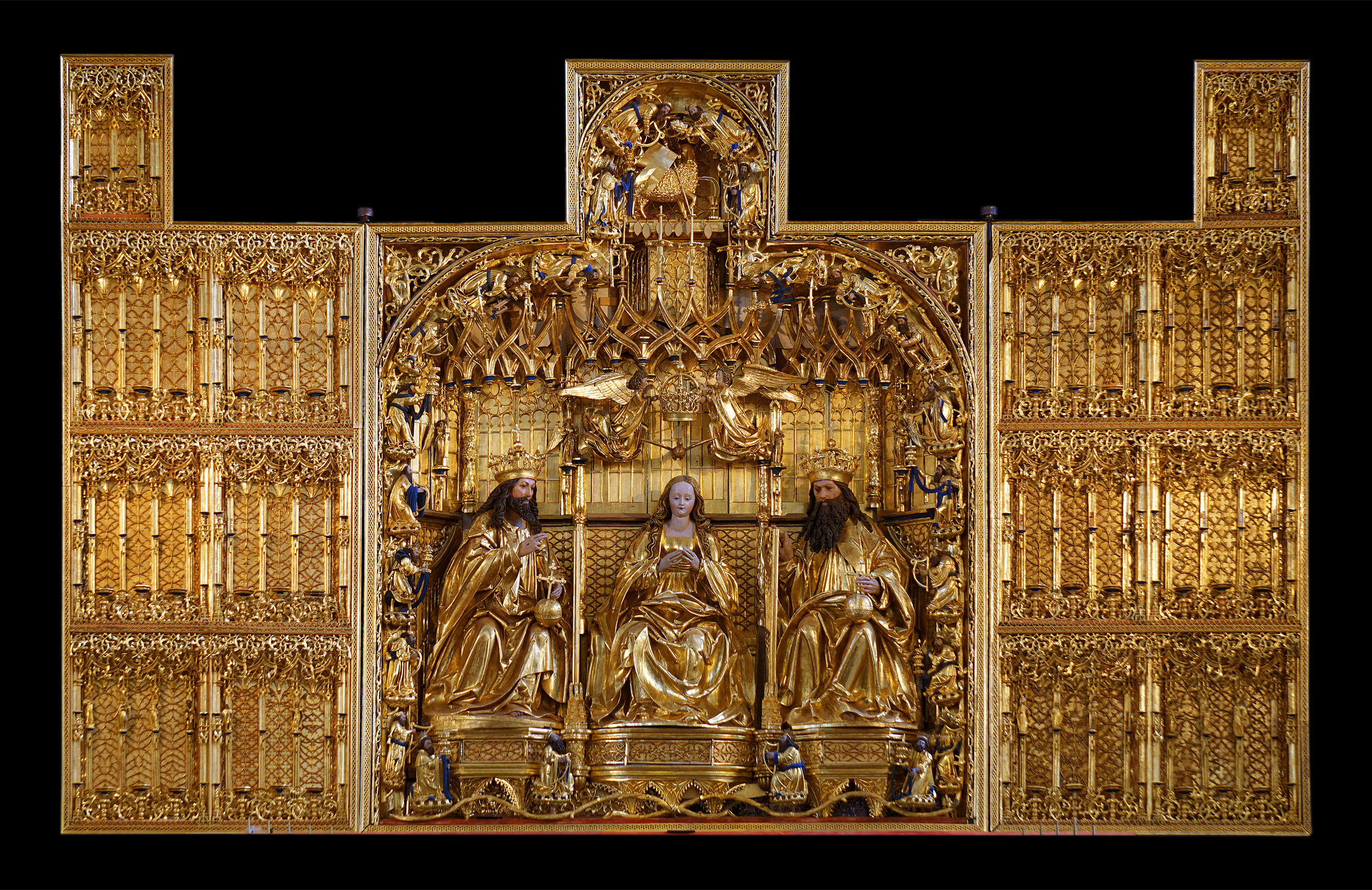 Ołtarz Koronacji Marii z Bazyliki Mariackiej w Gdańsku, po renowacji w 2018/2019